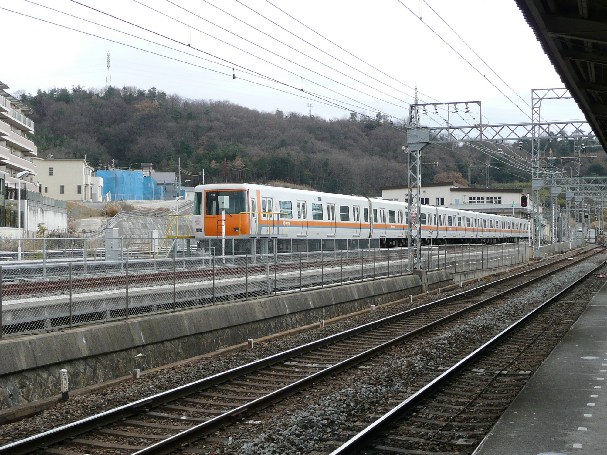 Kinki Nippon Railway,Keihanna Line,Higashi-Ikoma Rolling stock depot. / 近鉄けいはんな線東花園検車区東生駒車庫